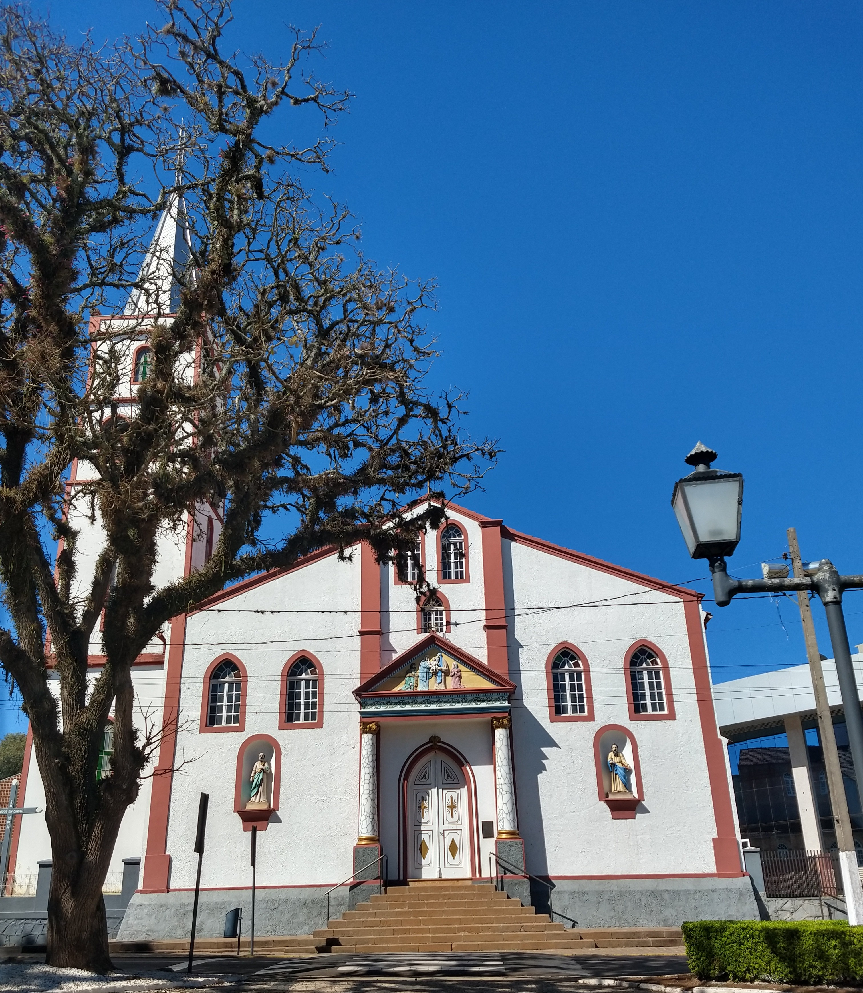 Fachada da histórica Catedral Nossa Senhora de Belém